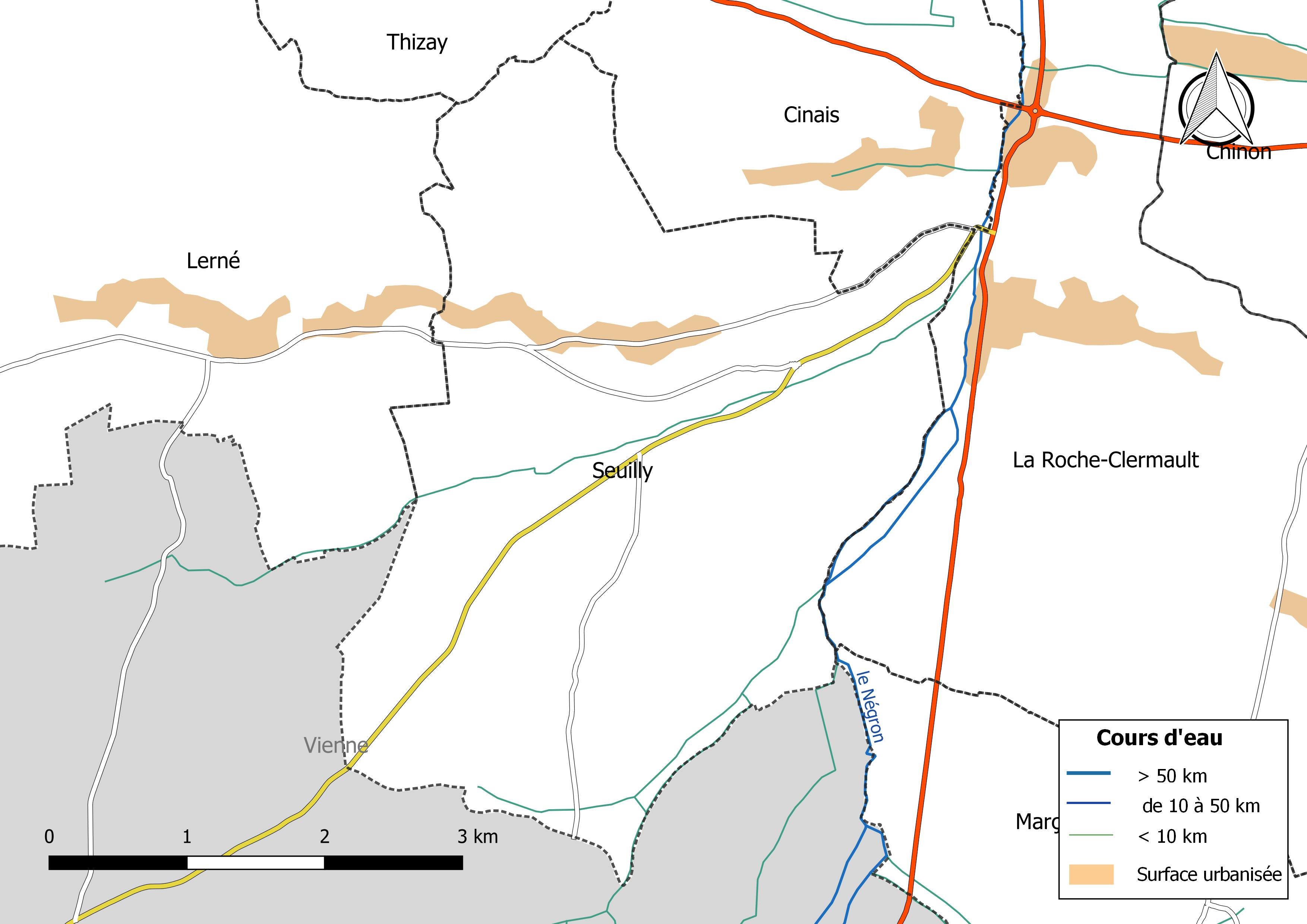 Carte du réseau hydrographique de la commune de Seuilly (France).